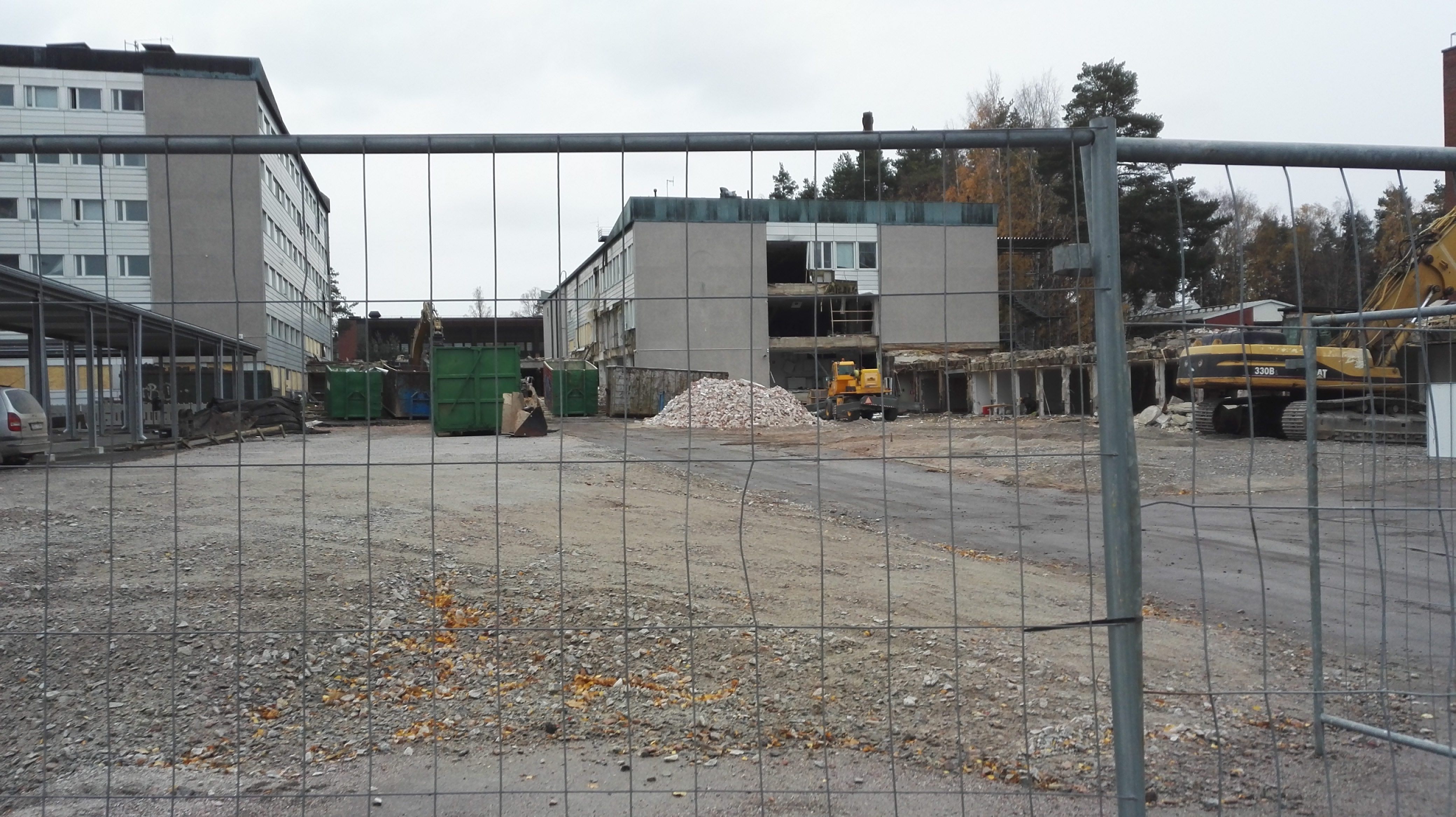 Otos rakennuksen purkutöistä syksyllä 2016.